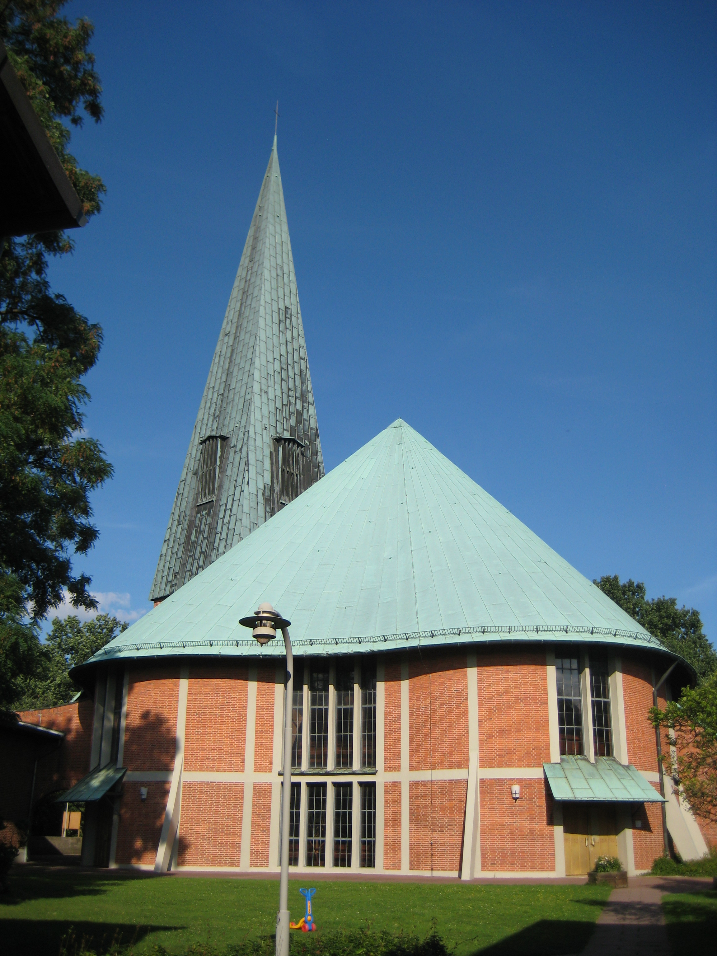 Kreuzkirche in Wolfsburg, Niedersachsen, Deutschland